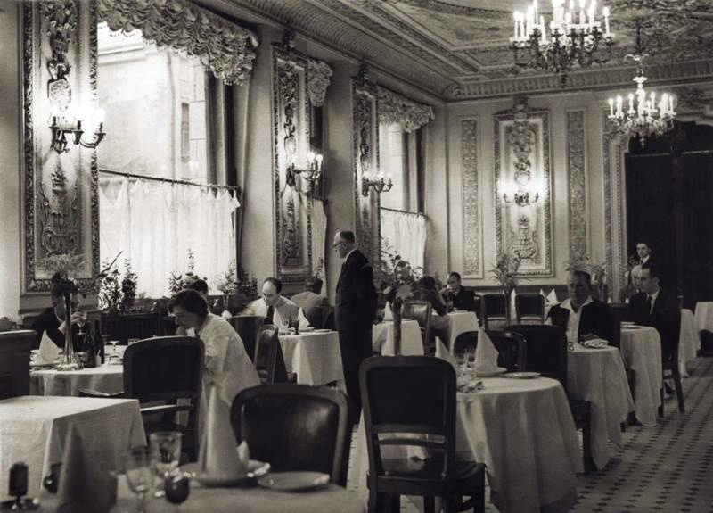 Ресторан гостиницы «Савой», 1930-е годы